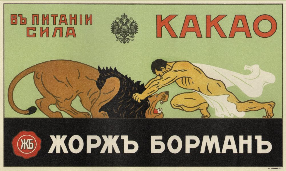 Плакат фирмы "Жорж Борман". В питании сила. Какао.